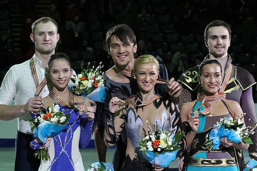 Подиум в парном катании на чемпионате Европы по фигурному катанию 2012. Слева на право: Вера Базарова/Юрий Ларионов (2-е место), Татьяна Волосожар/Максим Траньков (1-е есто), Ксения Столбова/Фёдор Климов (3-е место). Все - Россия.